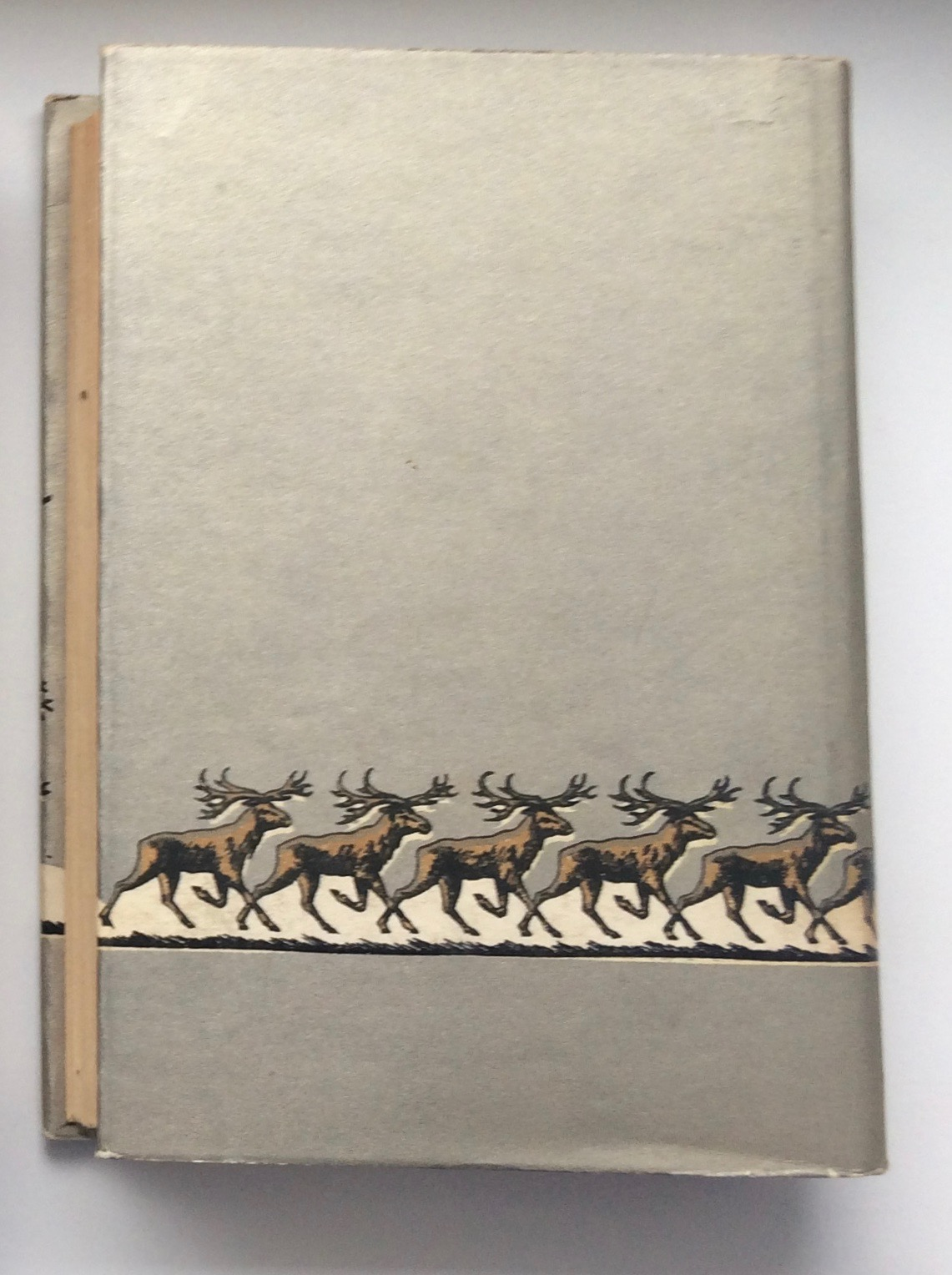 Tagakaas